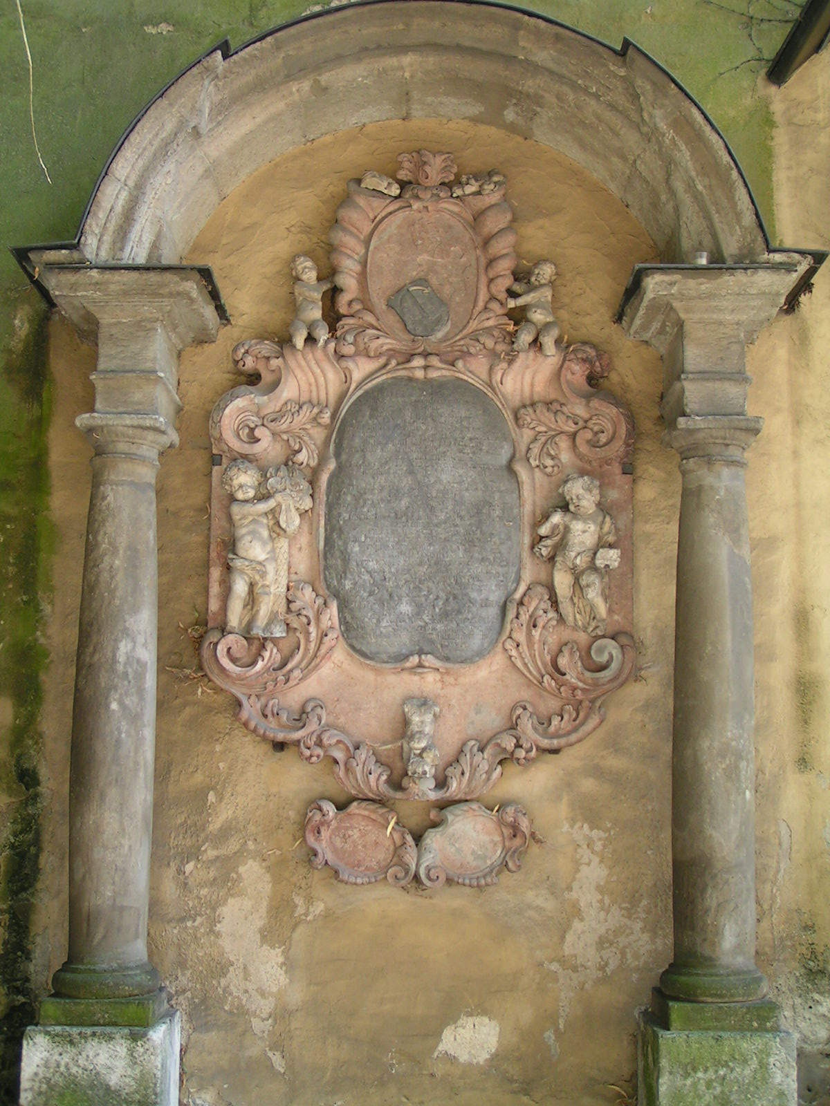 Epitaph für Johann Wilhelm von Stubenberg († 1663 in Wien) und dessen Ehefrau Felicitas Dorothea († 1667), den Eltern von Rudolph Wilhelm von Stubenberg († 1677), in dessen Auftrag das Epitaph errichtet wurde und der mit seiner ersten Ehefrau Maria Maximiliana († 1668) ebenfalls in dieser Grabstelle auf dem Gesandtenfriedhof bei der Dreieinigkeitskirche (Regensburg) begraben wurde